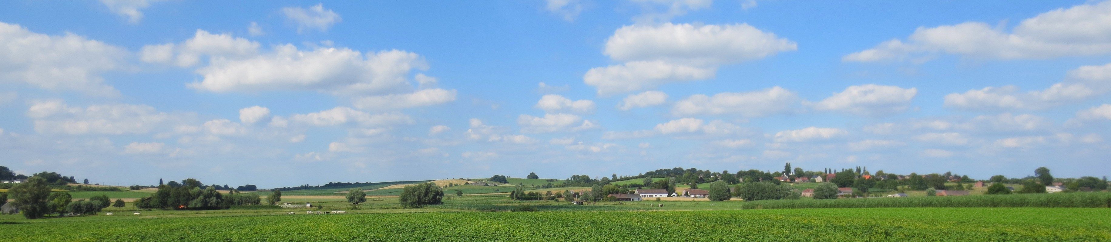 Havinnes